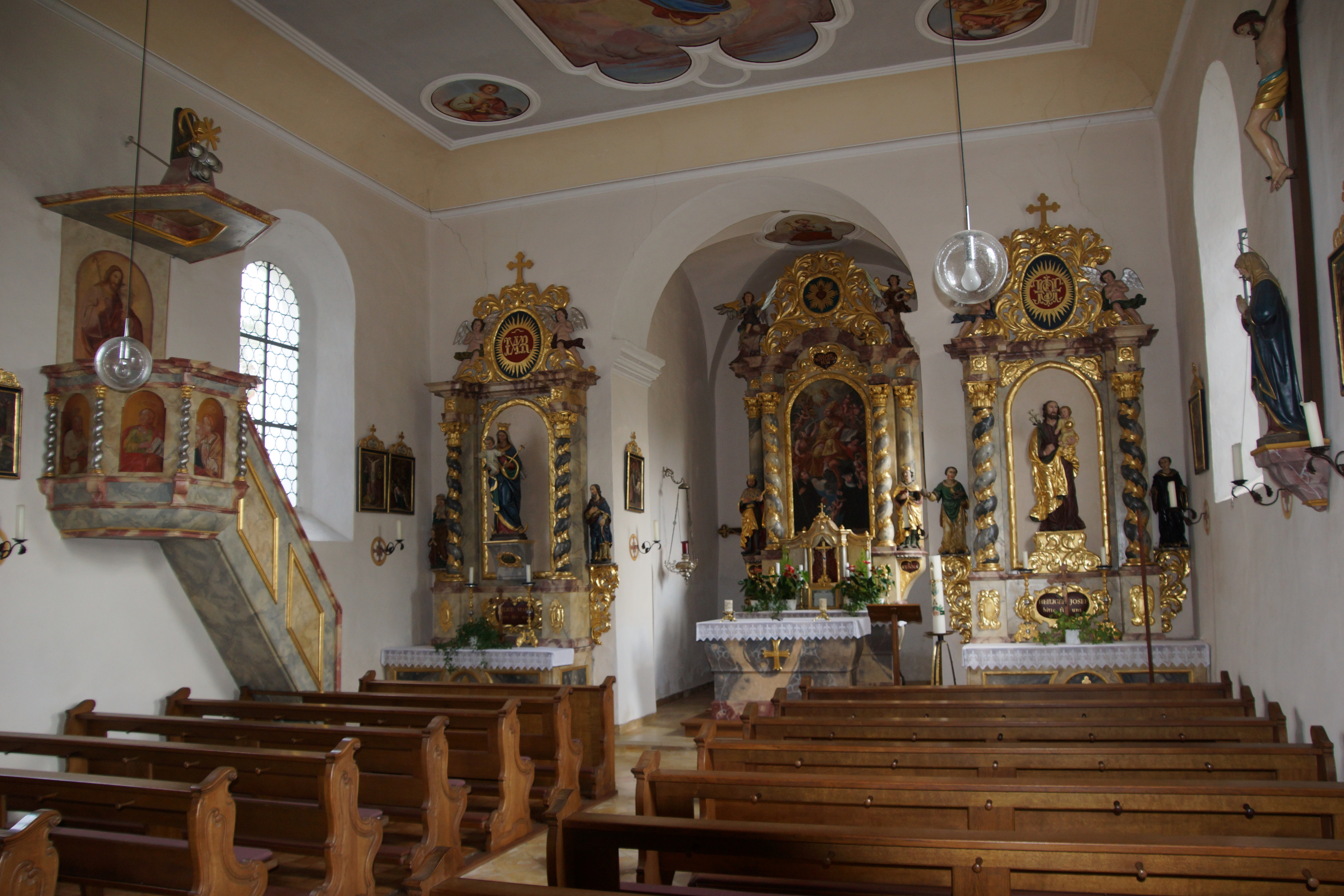 Die katholische Filialkirche St. Willibald in Groß-Thundorf